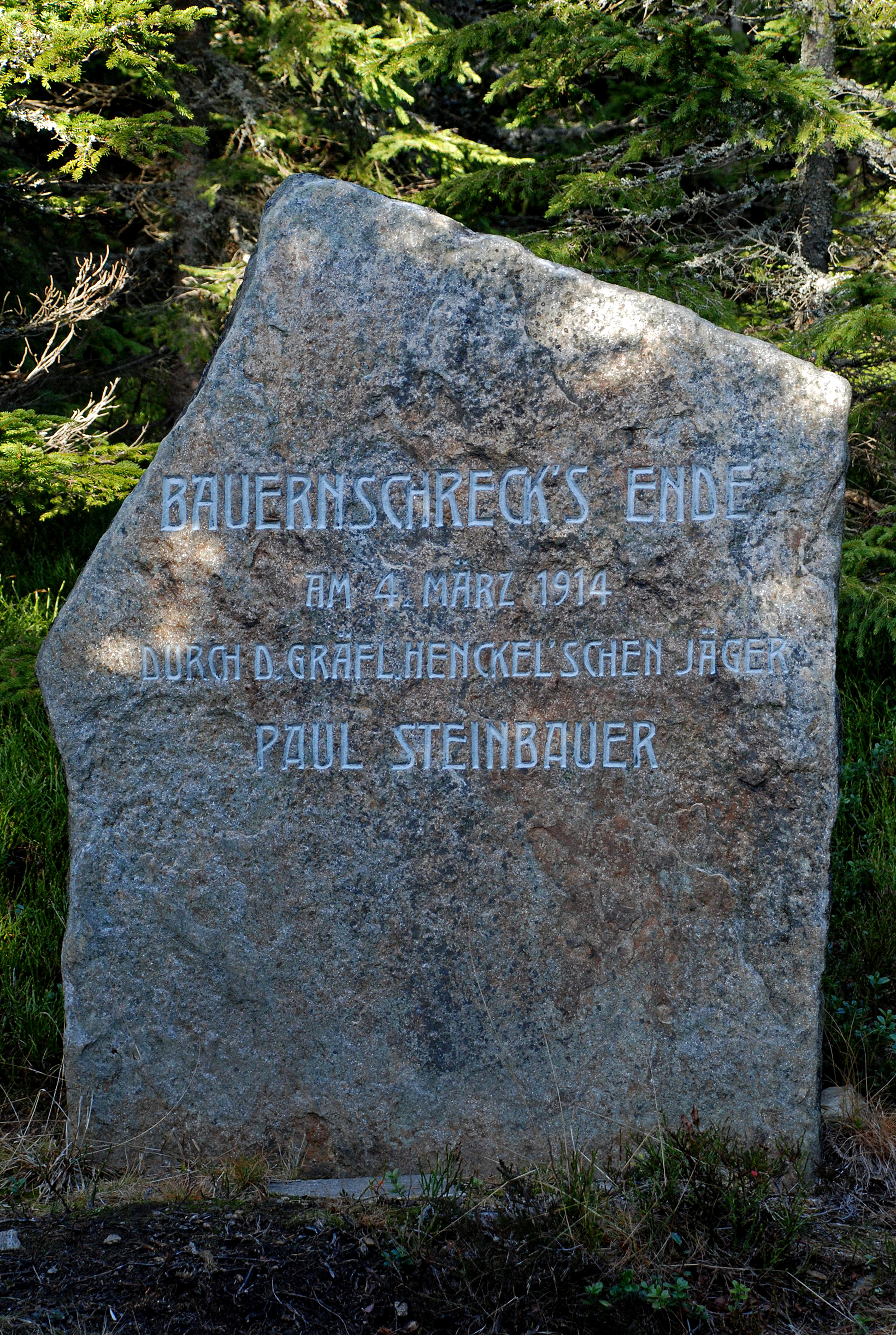 Wolfstein am Wildbachsattel, Frantschach-St.Gertraud. Das Datum bezieht sich auf den ersten Schuss durch den Jäger, bei dem das Tier aber nur verletzt worden war. Erlegt wurde es am folgenden Tag durch den Frantschacher Fabriksdirektor Max Diamant.